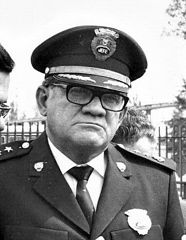 General Renato Vega Amador